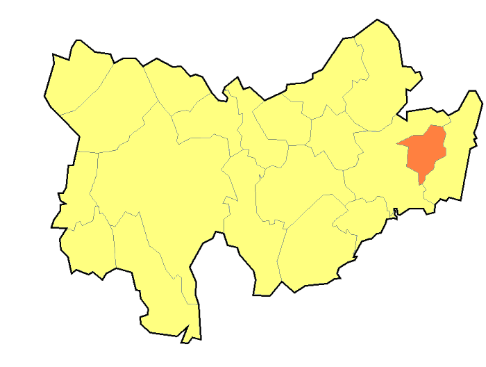 Hranice Malínky (Vyškov-(Bučovice)- czech republic)